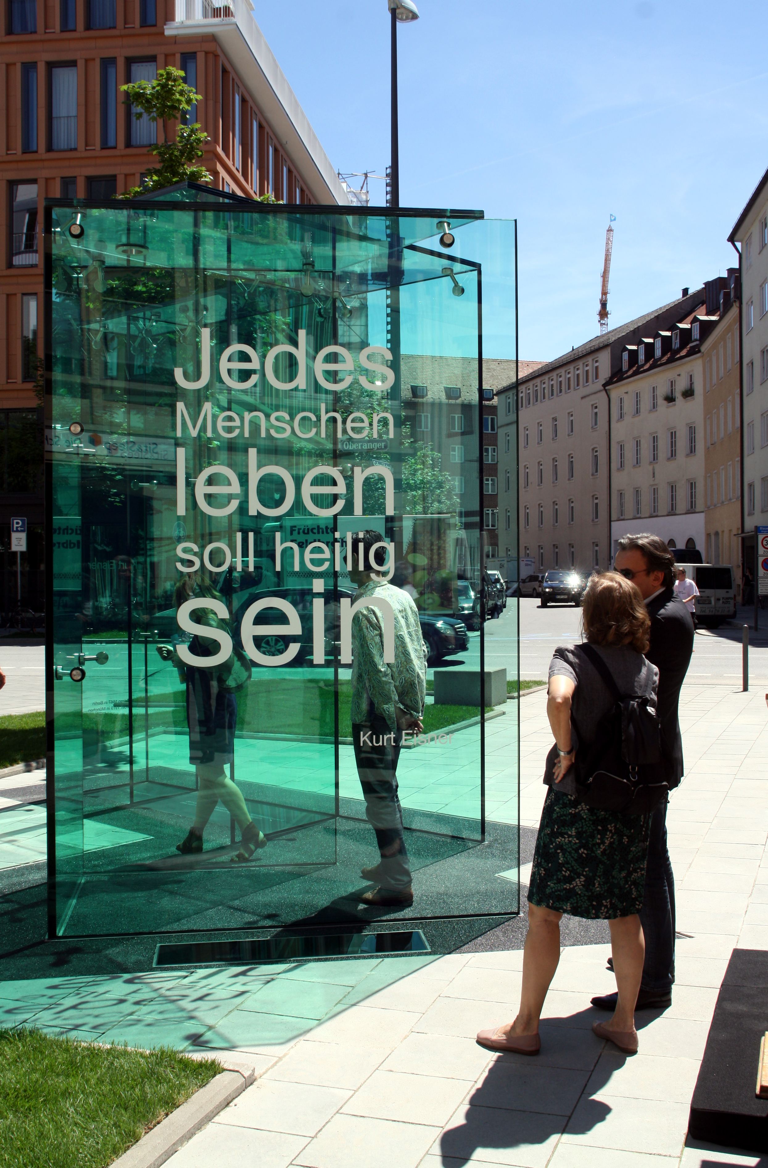 Das gläserne und begehbare Kurt-Eisner-Denkmal mit der Inschrift "Jedes Menschenleben soll heilig sein", wie es am 30. Mai 2011 in München (Oberanger) der Öffentlichkeit übergeben wurde.